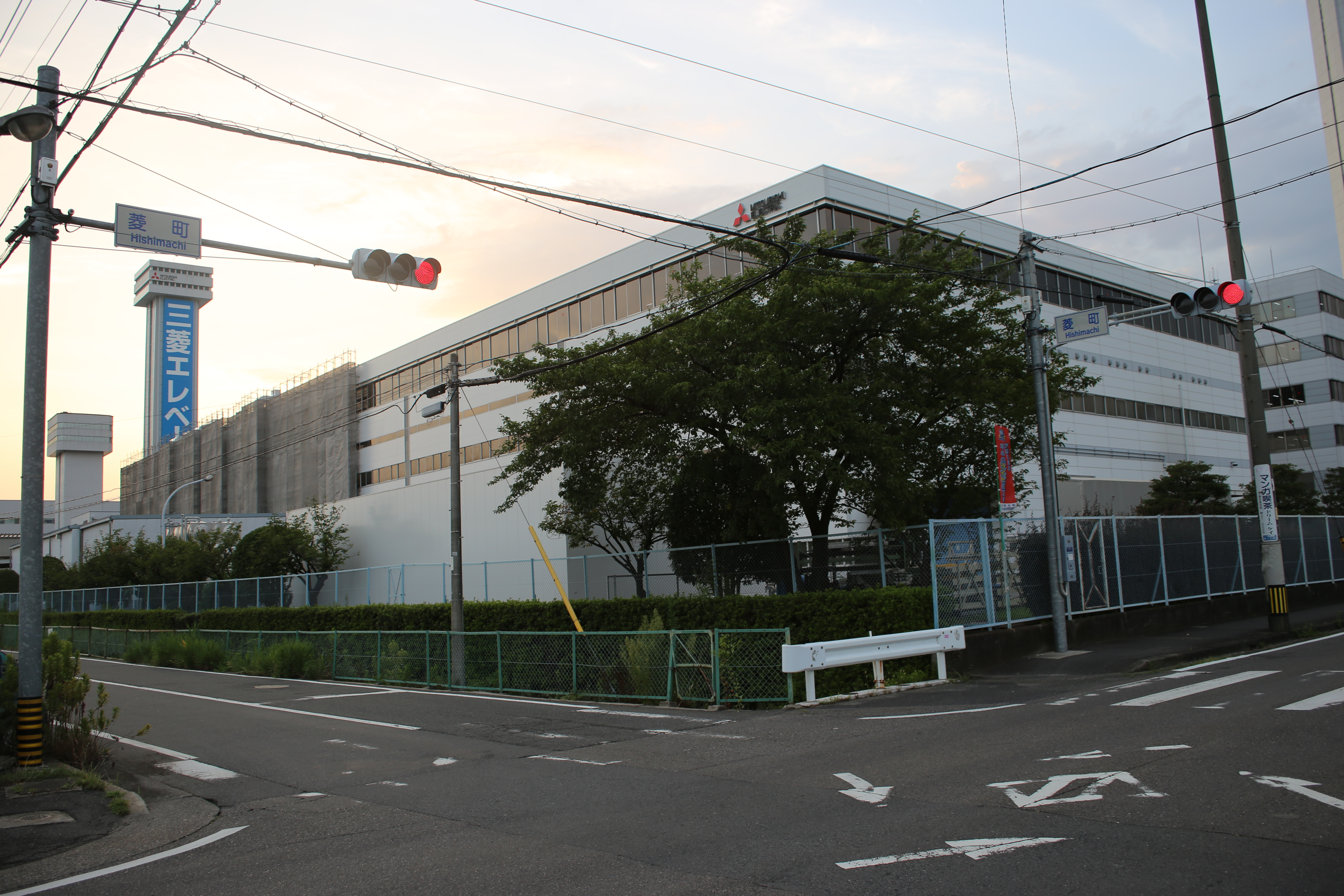 愛知県稲沢市菱町の「菱町」交差点